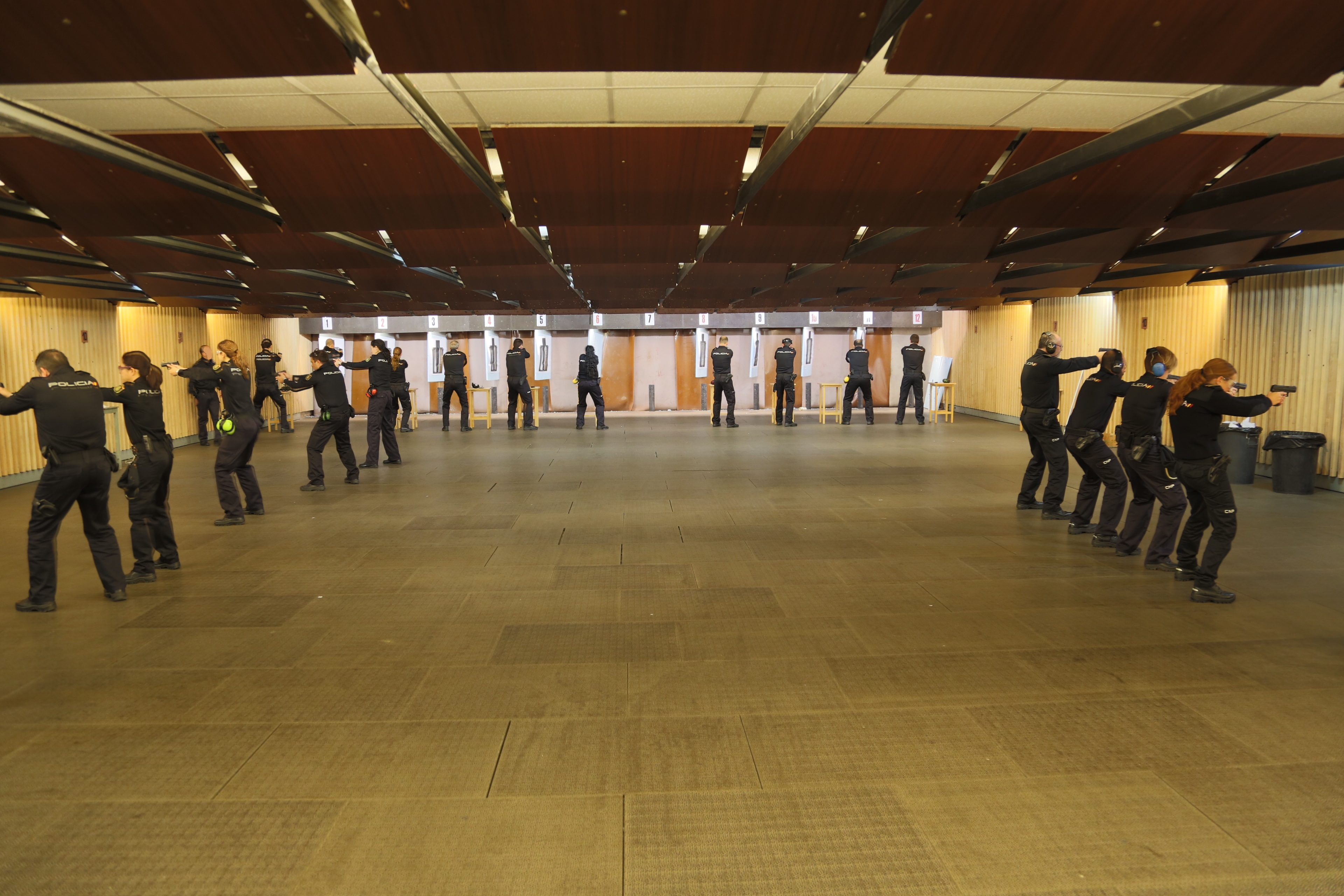 Galería tiro interior